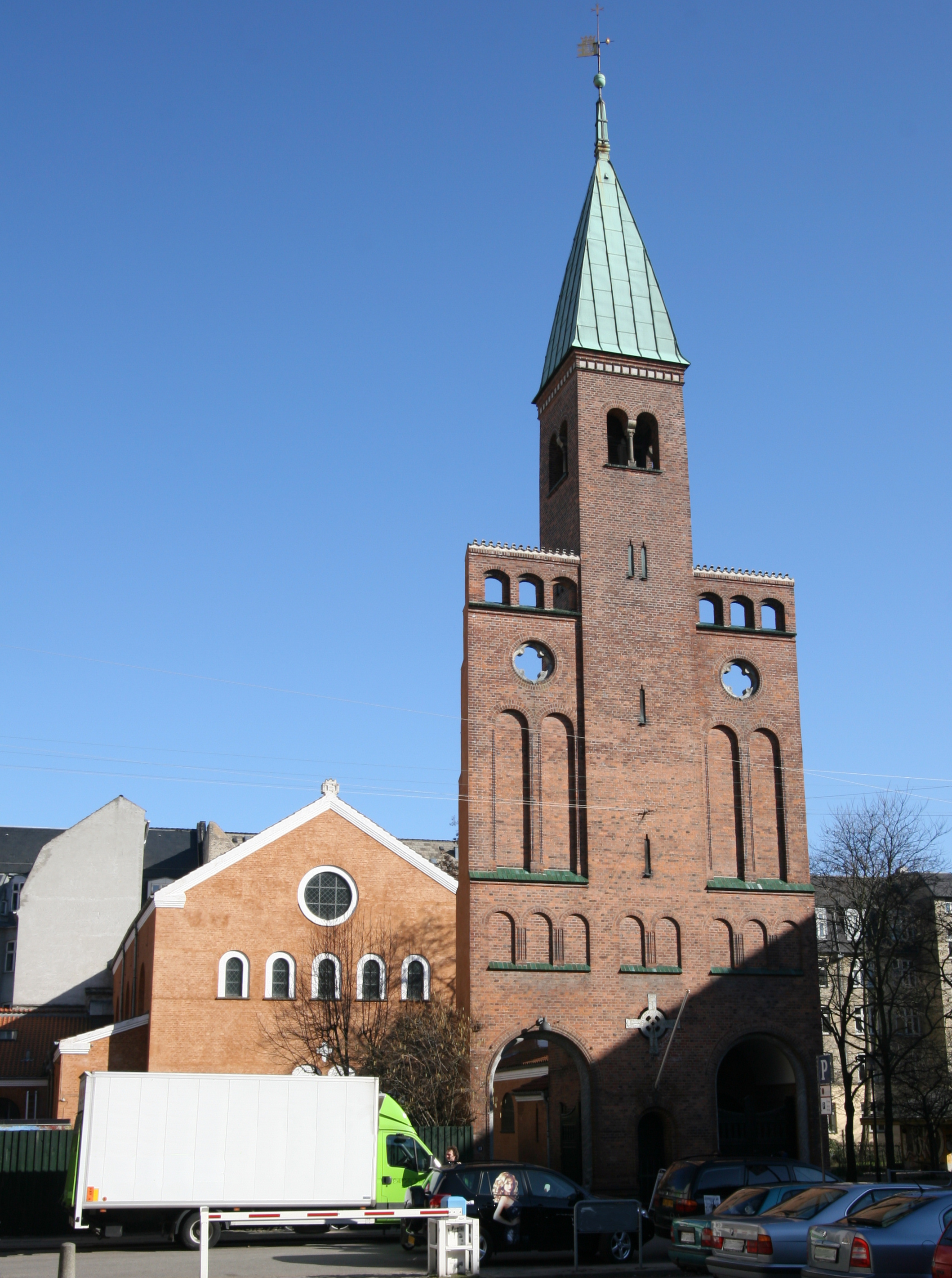 Apostelkirken, Vesterbro, Copenhagen, Denmark.